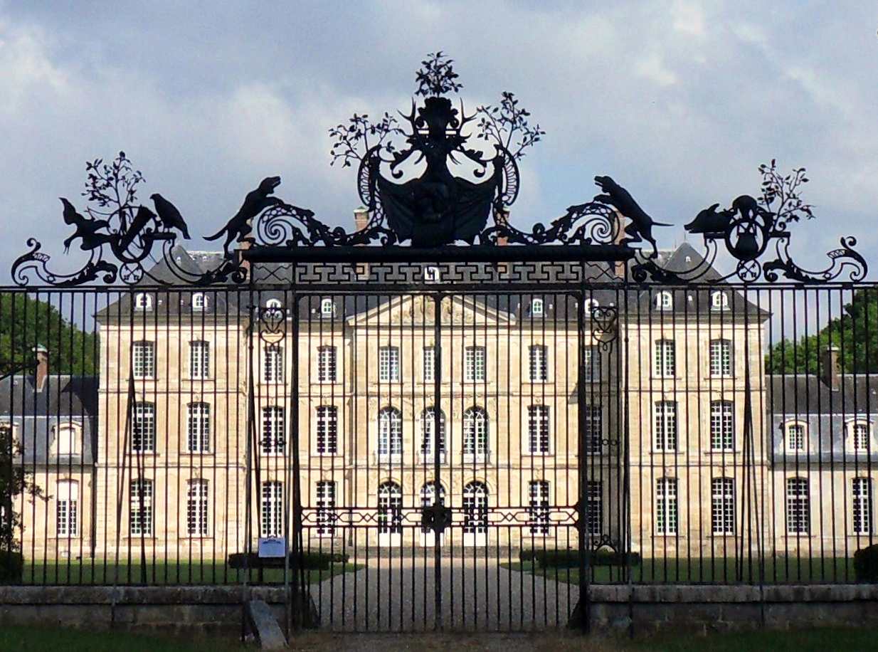 Bertangles (Somme, France). Le château et la grille d'honneur.